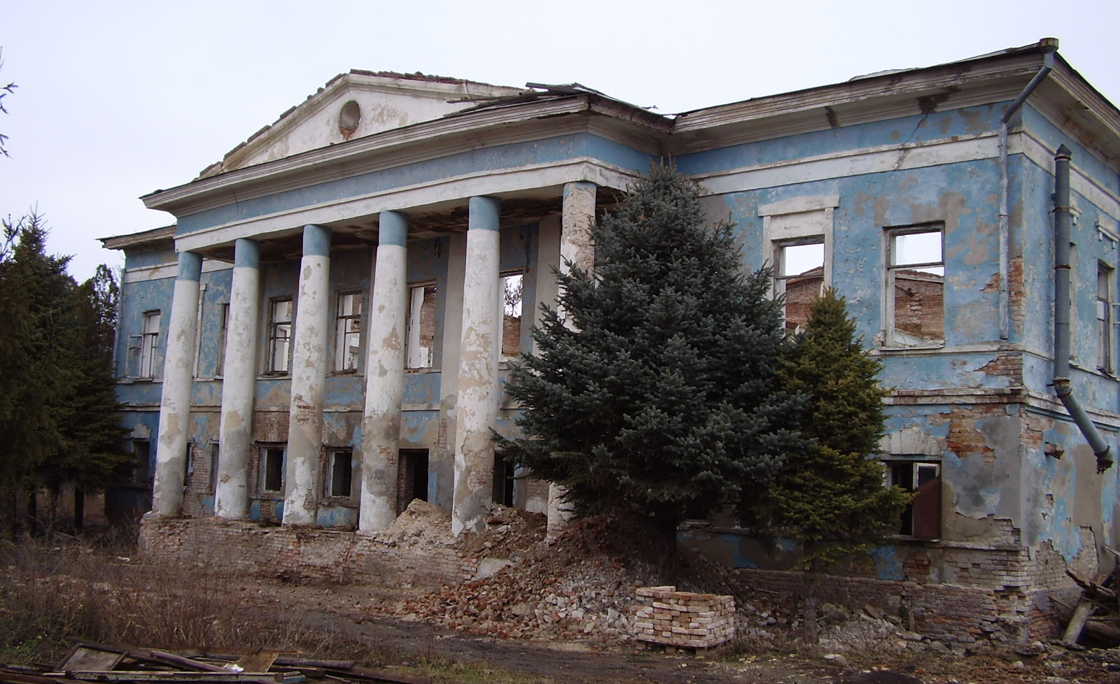 Заміська садиба (Панський будинок). Друга половина 18 століття. Адреса: с. Весела Гора, Славяносебскій район, м. Луганськ. Фото від 13.02.2007 р